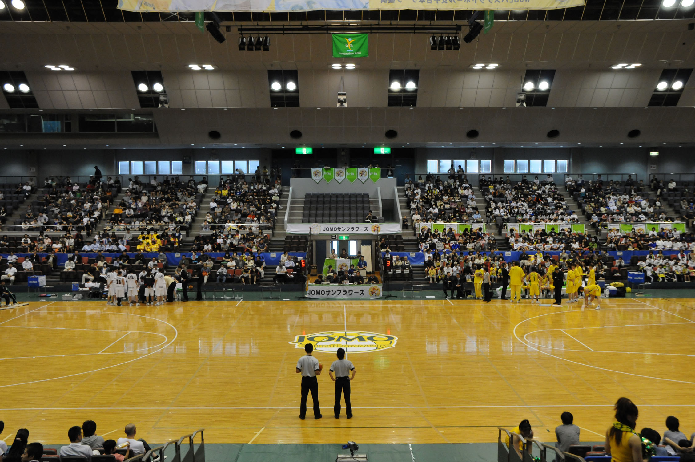 船橋アリーナ、内部。